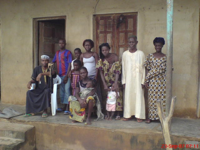 Photo d'une famille à Gbogolo